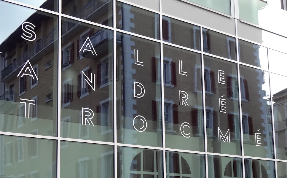 Maison de paroisse de Saint-Gervais, après rénovation et agrandissement. Construite en 1921 par les architectes Georges Peloux et Maxime de Rham.